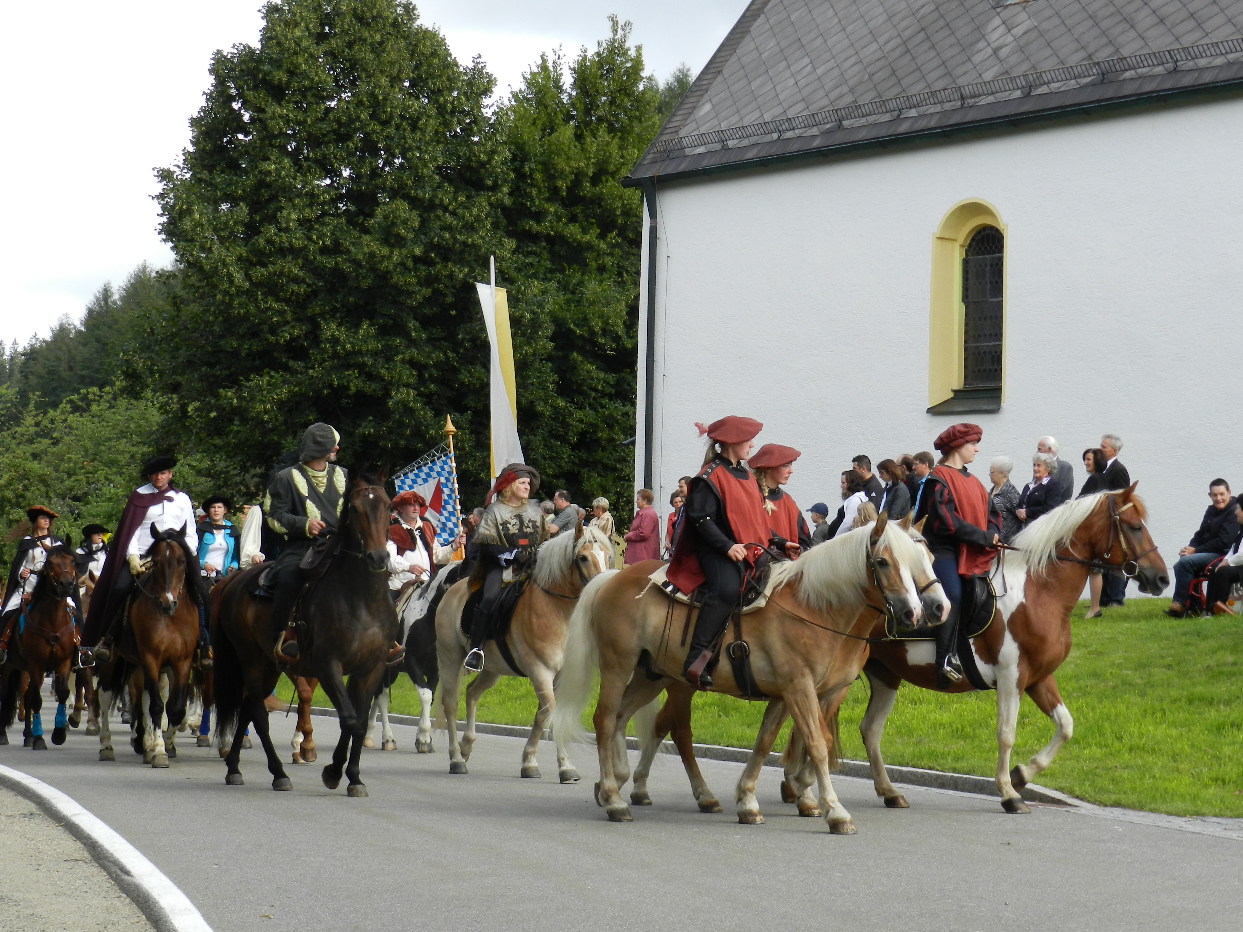 St. Jodokritt in Tännesberg, Zug der Ritter zur Wallfahrtskirche St. Jodok (24. Juli 2011)